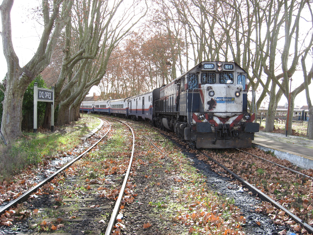 Tren #305 de la empresa Ferrobaires en su ingreso a la estación Dolores, Ferrocarril General Roca vía a Mar del Plata.